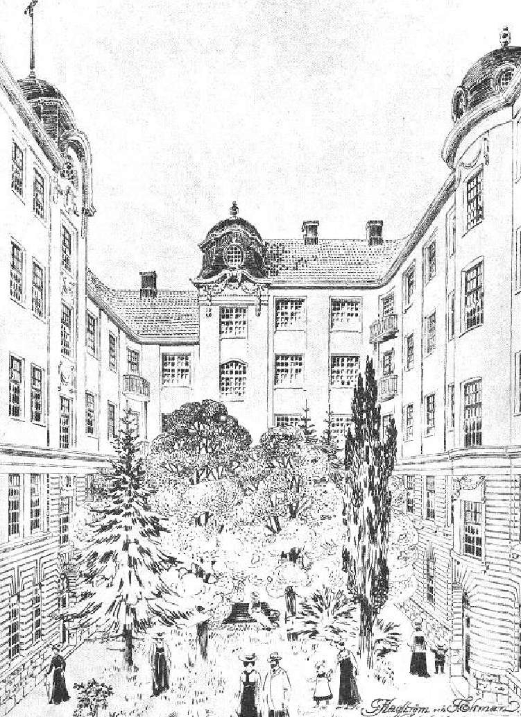 zeichnung des hemgarden stockholm östermalm